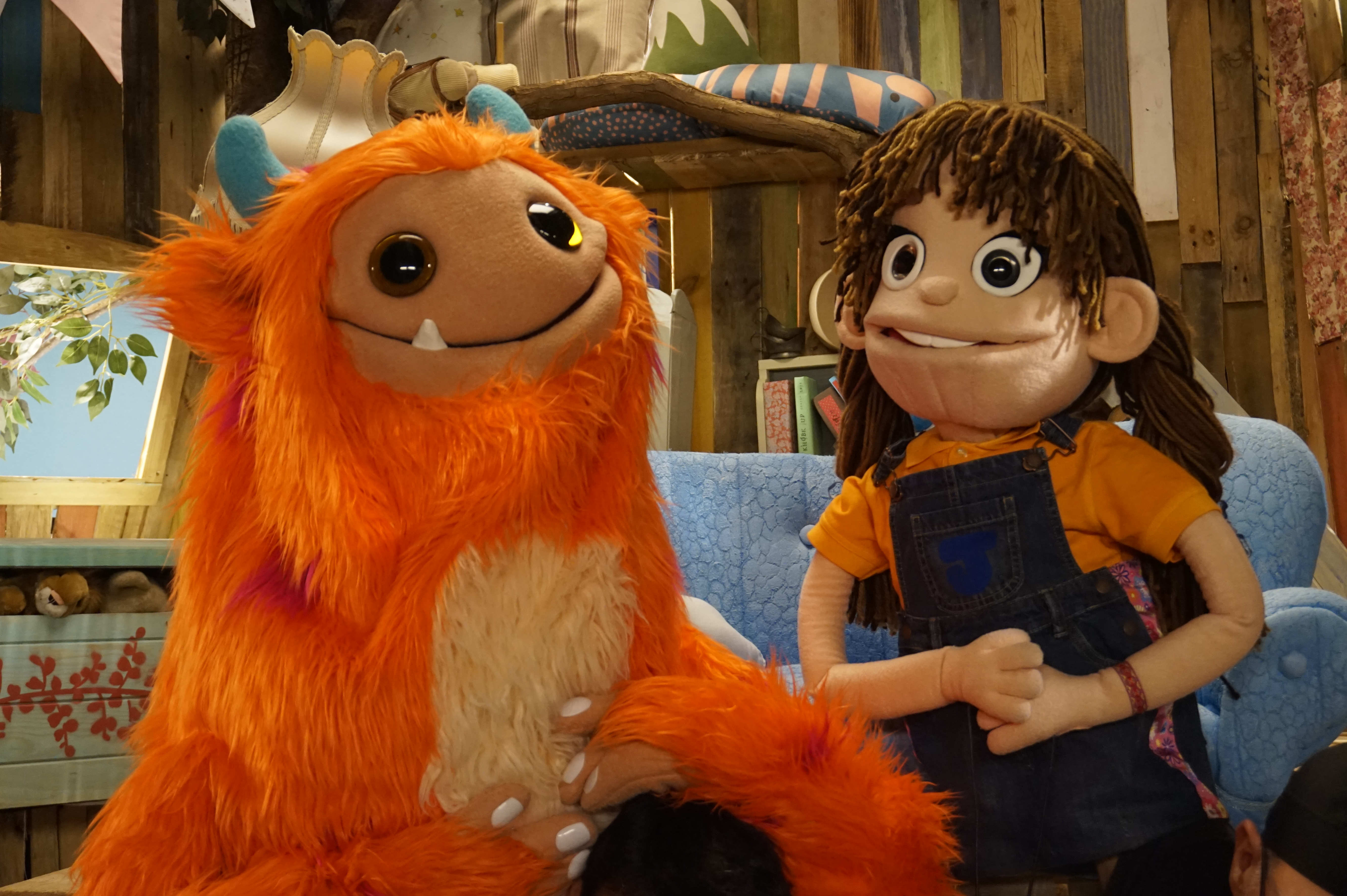 Escenes del rodatge de la sèrie de titelles (muppets) "Júlia i Gilbert", de Famazing Entertainment per a À Punt Mèdia.